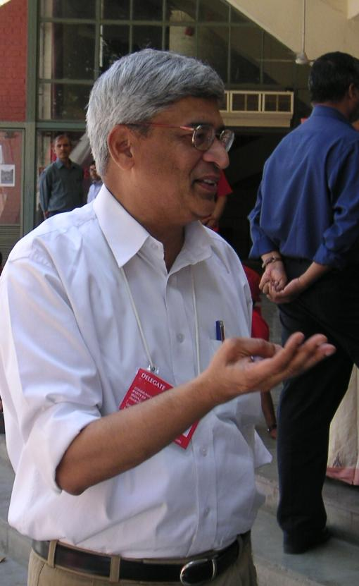 Prakash Karat, general secretary of CPI(M)